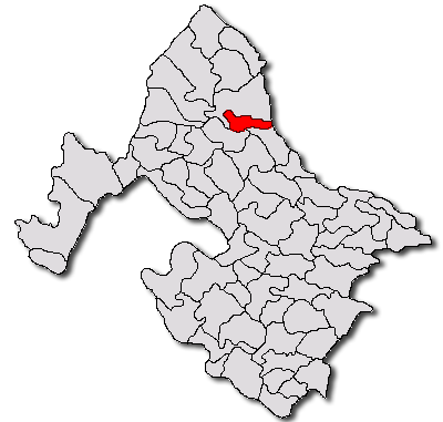 Categorie:Hărţi ale judeţului Mehedinţi